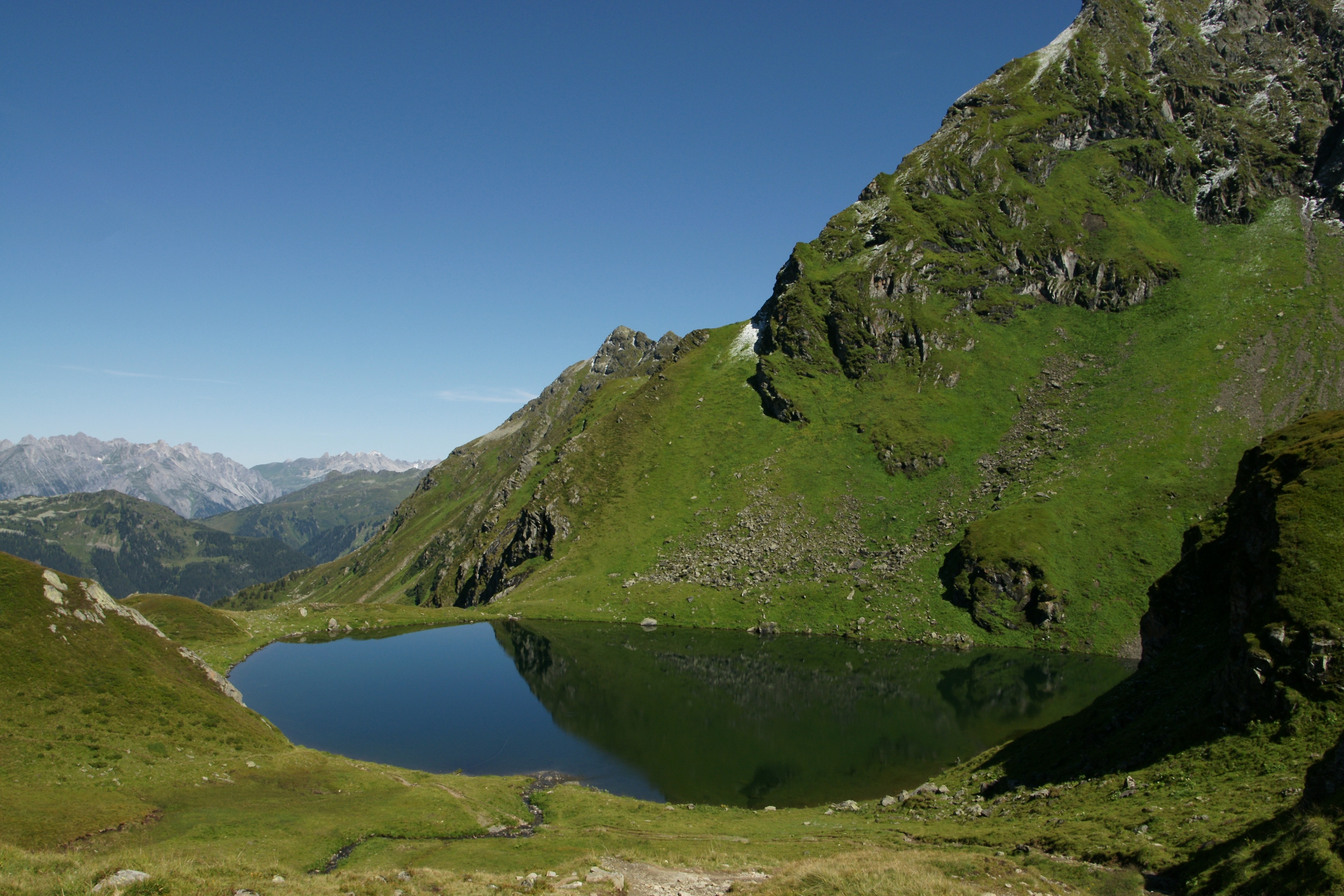 Blick auf den Schwarzsee (Schruns) am Fusse des Hochjochs in Schruns.